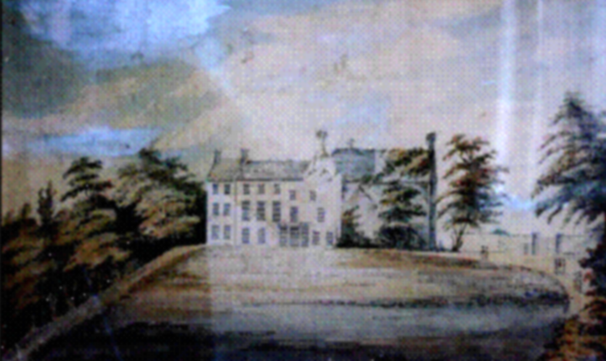 Gemälde des Herrenhauses des umgebauten Tralee Castle, 1824. Gemalt zwei Jahre vor dem Abriss des Herrenhauses. Blick vom Park aus Richtung Süden auf das in Ost-West-Richtung stehende Gebäude This object is indexed in the Archaeological Survey of Ireland under SMR No. KE029-119030-Geographic information system of the National Monuments Service: Historic Environment Viewer – Database record.